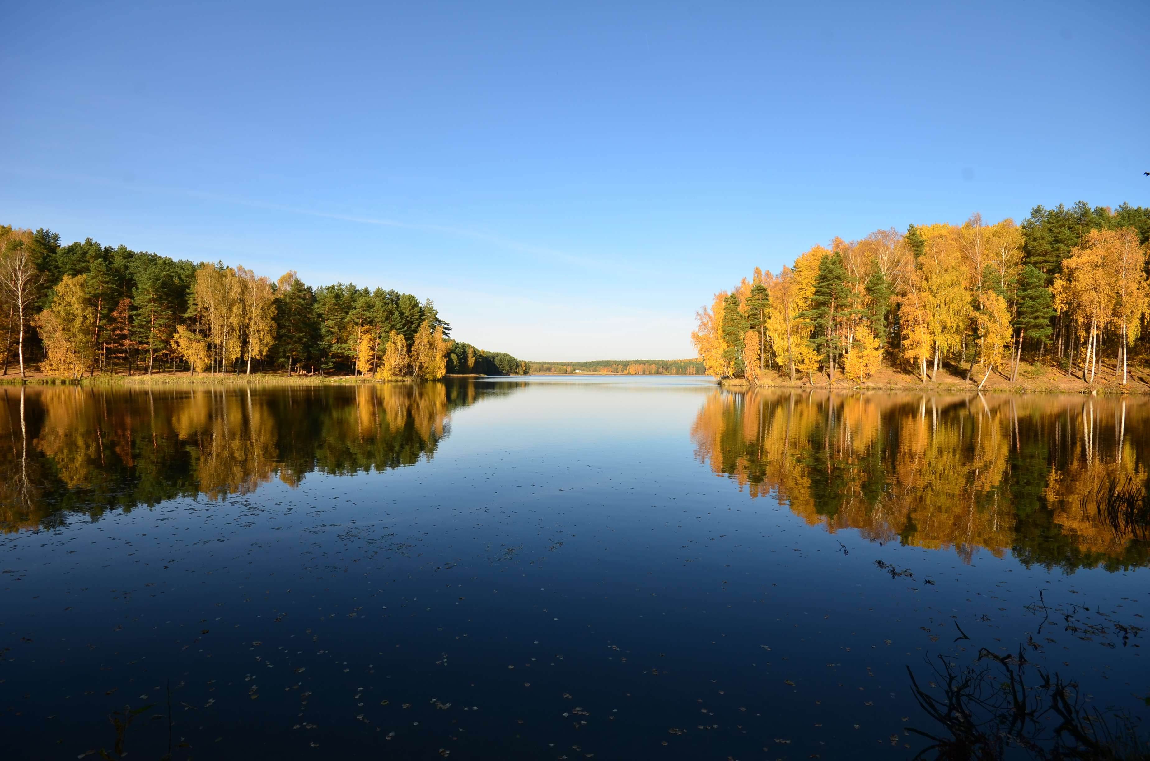 Jurgežeriai 2012